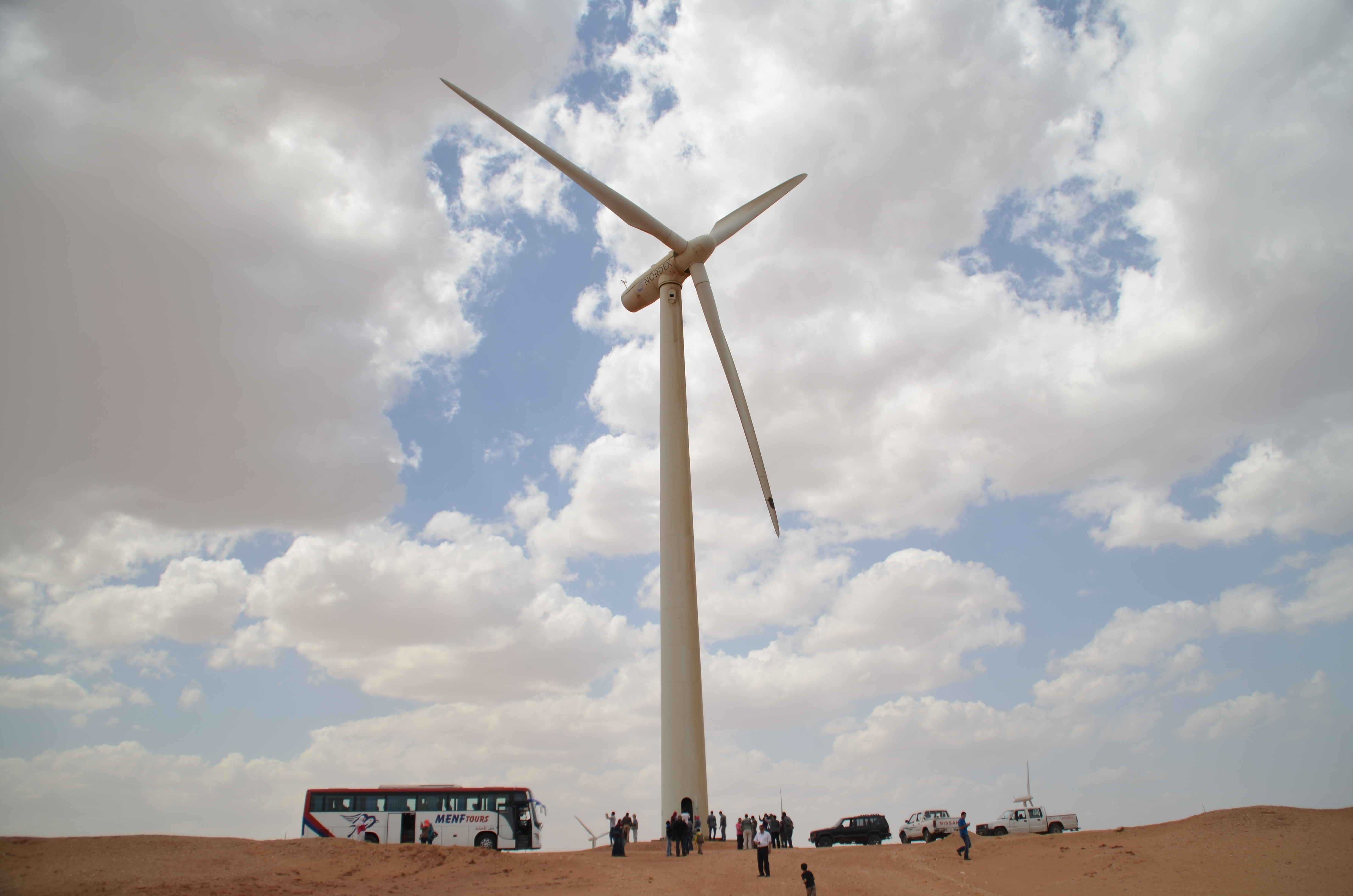 رحلة الجمعية المصرية لحماية الطبيعة الى محطة توليد الكهرباء من الرياح في اطار الاحتفال باليوم العالمي للطيور المهاجرة